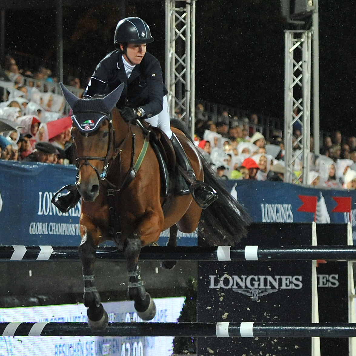 Vienna Masters am 21. September 2013 Longines Global Champions Tour Laura Kraut (USA) auf Jubilee d'Ouilly